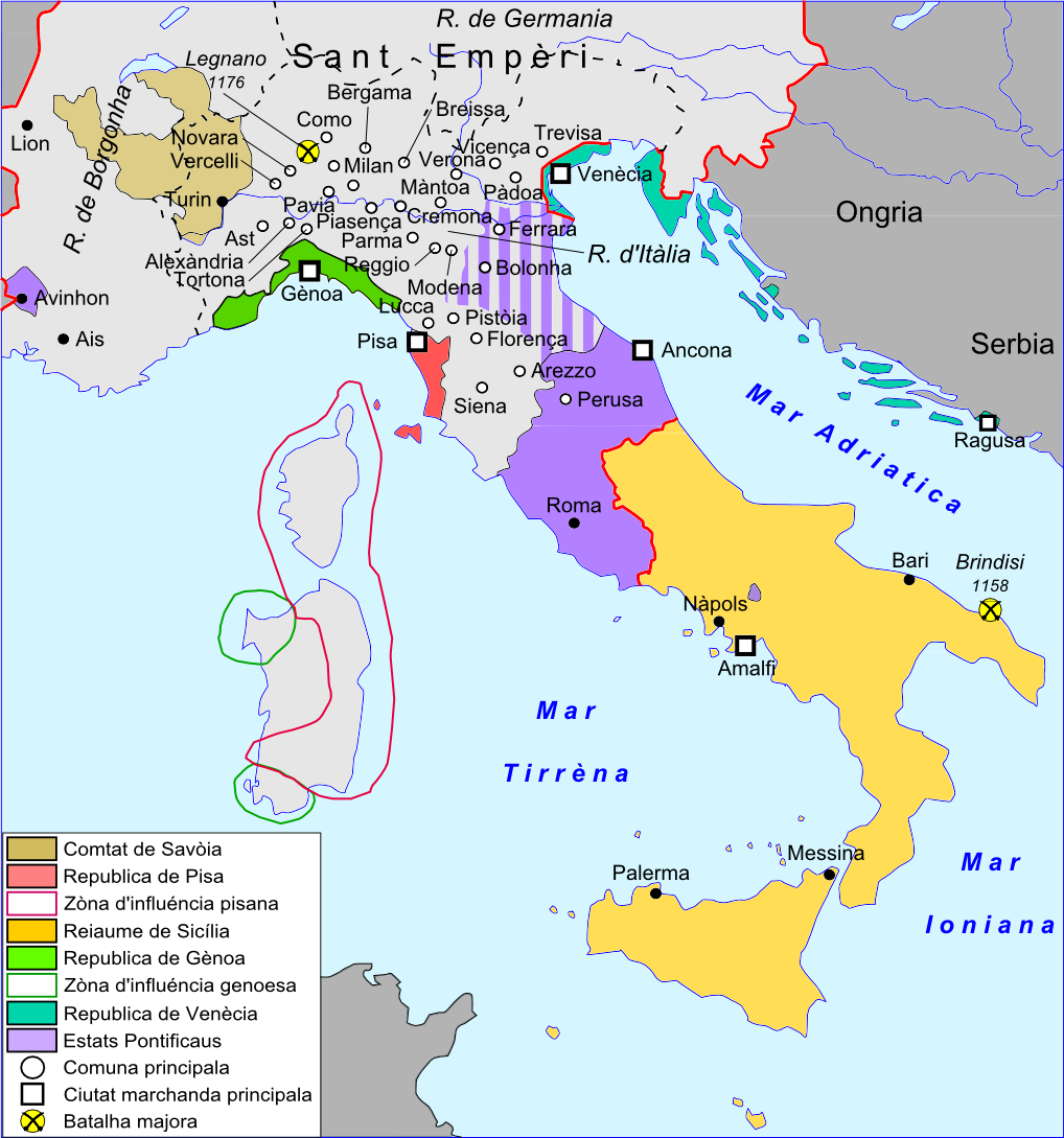 Itàlia vèrs 1250.